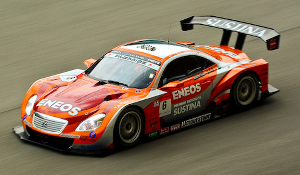 Lexus Team LeMans ENEOS